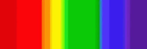 spectre continu linéaire visible dans un spectroscope à réseau diffractant